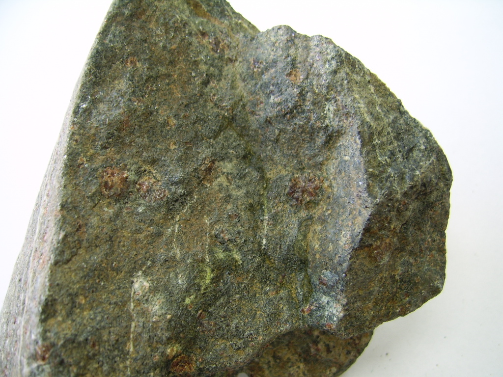 Eclogite